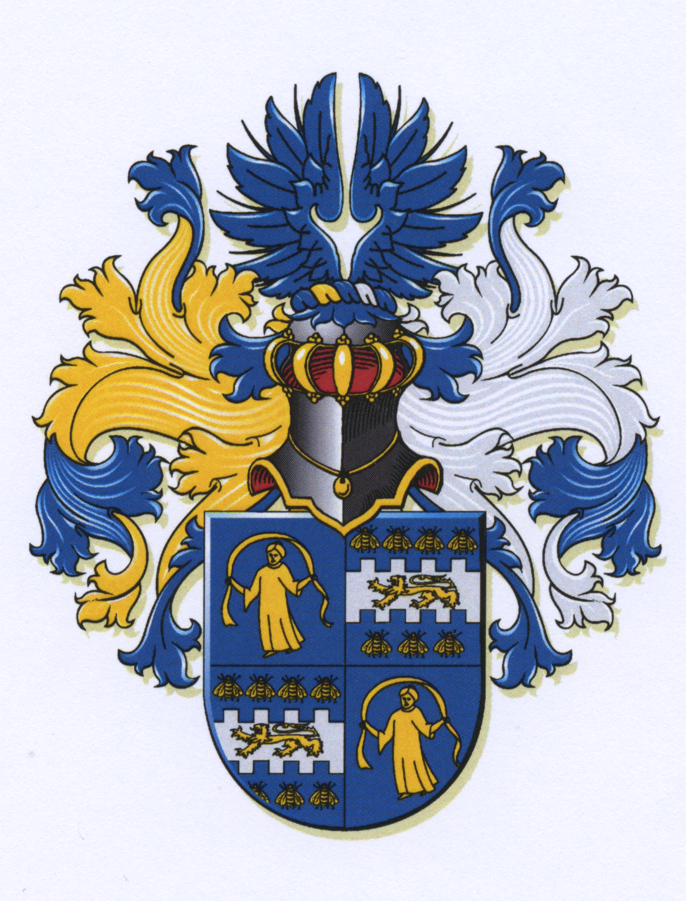 Wapen van de familie Droogleever Fortuyn Wapen: gevierendeeld: I en IV in blauw een Fortuna met een sluier boven haar hoofd uitwaaierend, alles goud (Fortuyn); II en III en blauw een zilveren beurtelings gekanteelde dwarsbalk, beladen met een gouden gaande leeuw, vergezeld van zeven gouden bijen (4-3) (Droogleever). Helmteken: een blauwe vlucht Dekkleden: rechts: blauw, gevoerd van goud; links blauw, gevoerd van zilver.